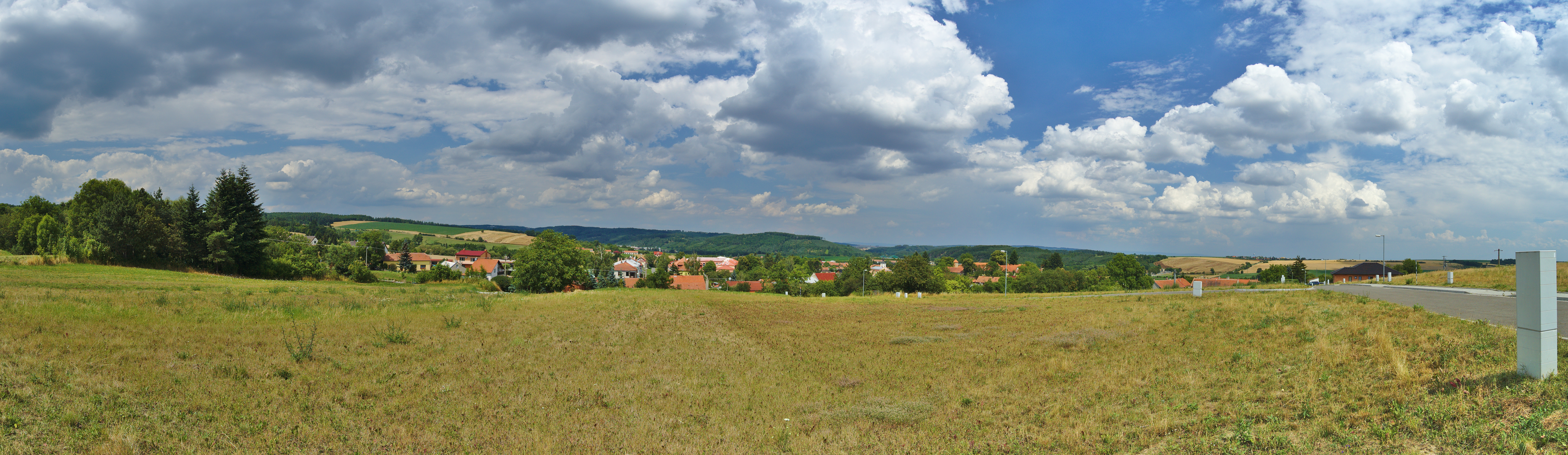 Panorama Ptení od jihu, okres Prostějov